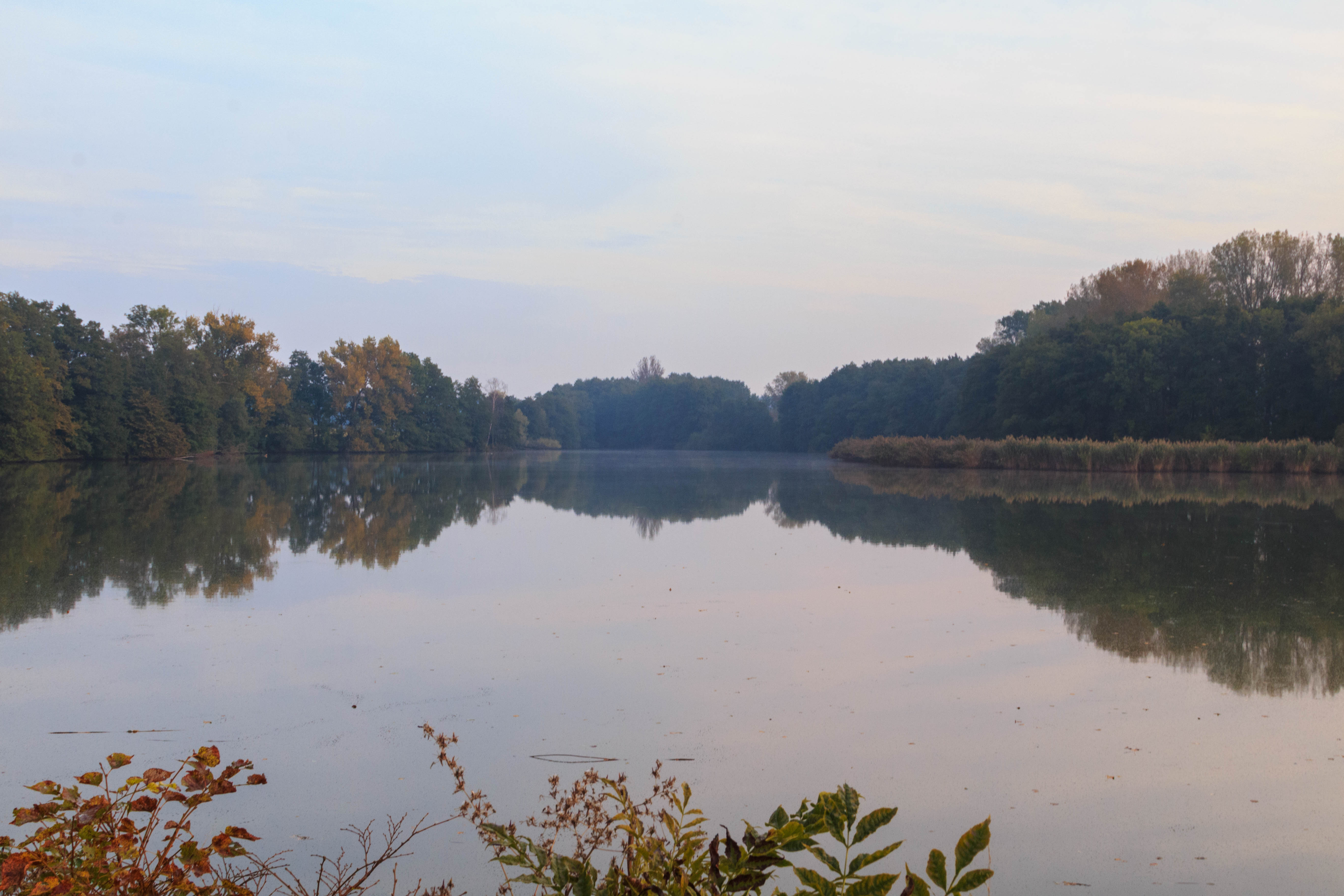 Velký Zálešský rybník